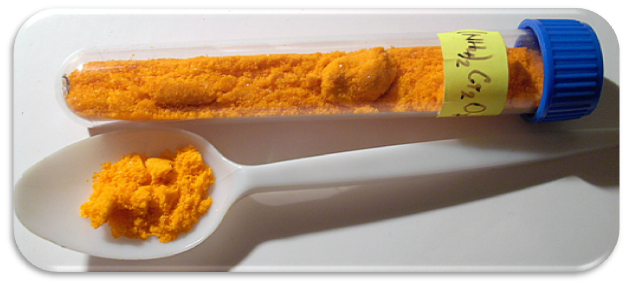 Dichroman amoný